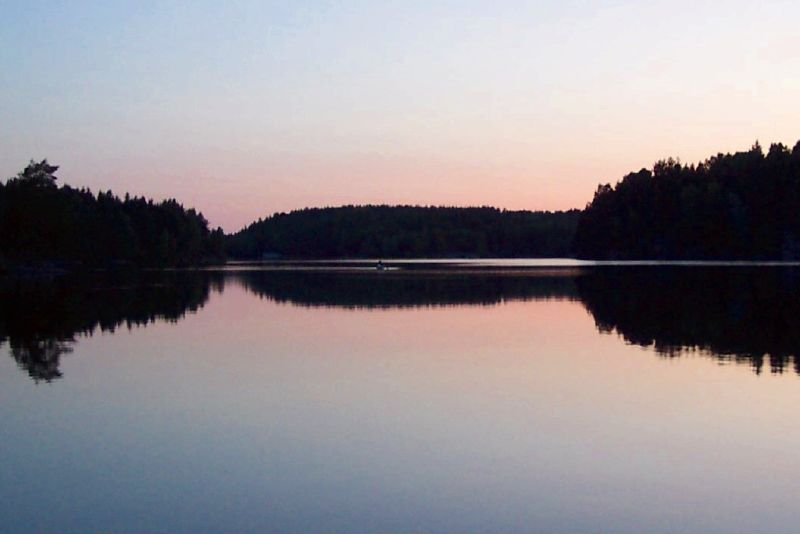 The lake Nøklevann in Oslo, Norway